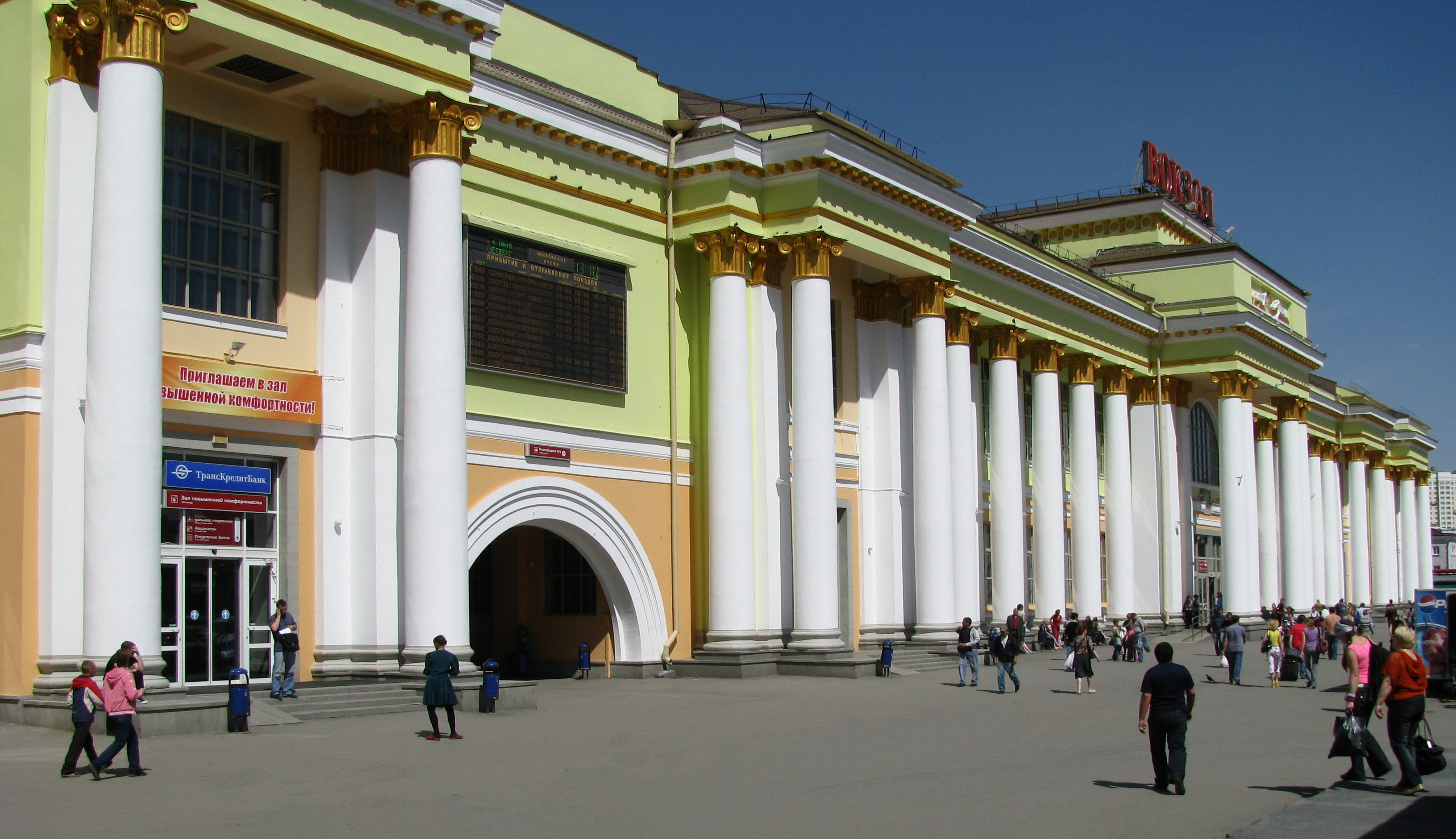 Вокзал Станции Екатеринбург-Пассажирский в Екатеринбурге